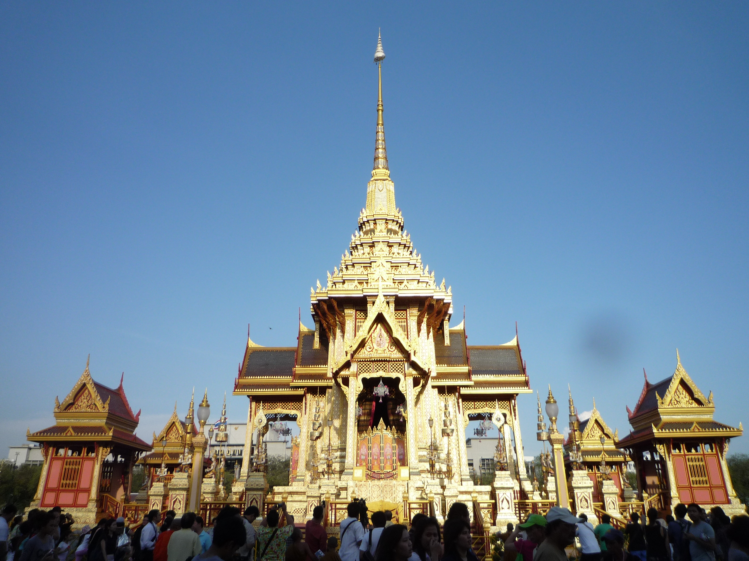 พระเมรุ สมเด็จพระเจ้าภคินีเธอ เจ้าฟ้าเพชรรัตนราชสุดา สิริโสภาพัณณวดี ถ่ายเมื่อ 12 เมษายน 2555